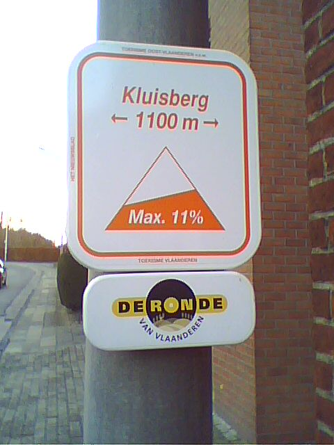 Panneau en bas du Kluisberg